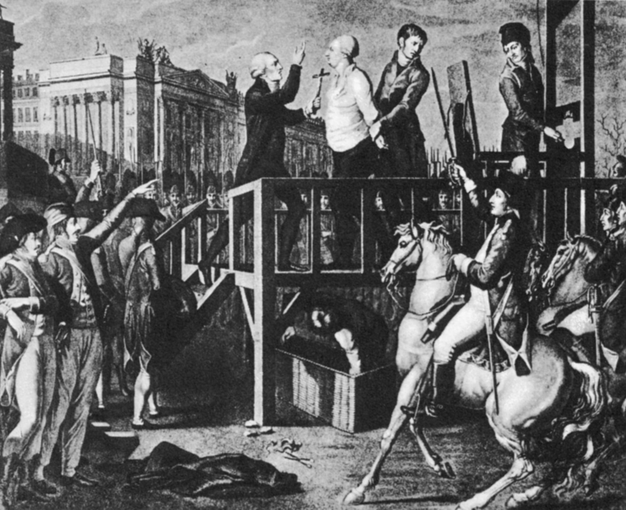 Hinrichtung_Ludwig_XVI_von_Frankreich(1754-1793)